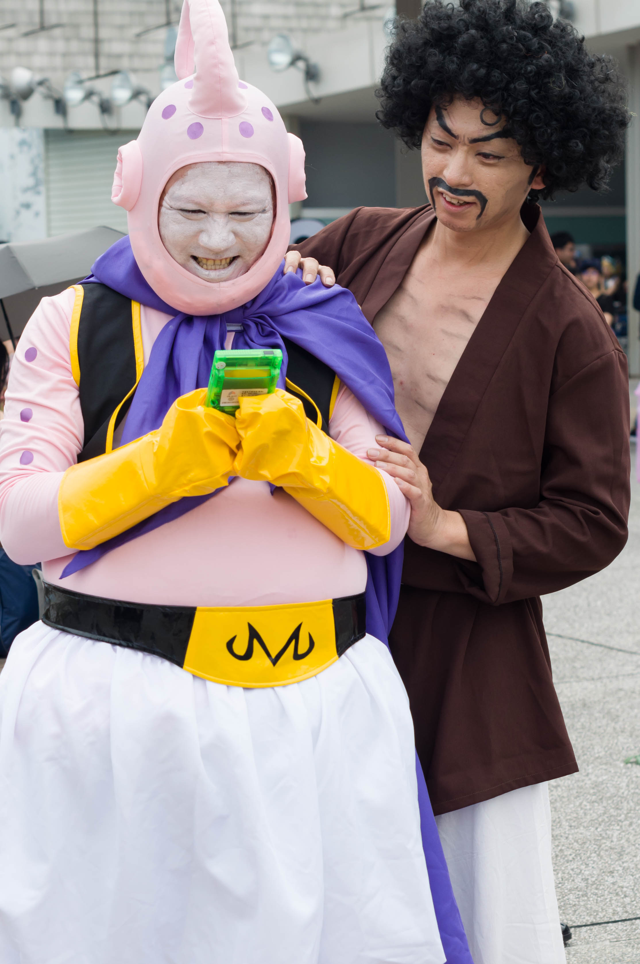 第26屆亞洲動漫創作展，《七龍珠Z》魔人普烏（左）、撒旦先生（右）cosplayer。